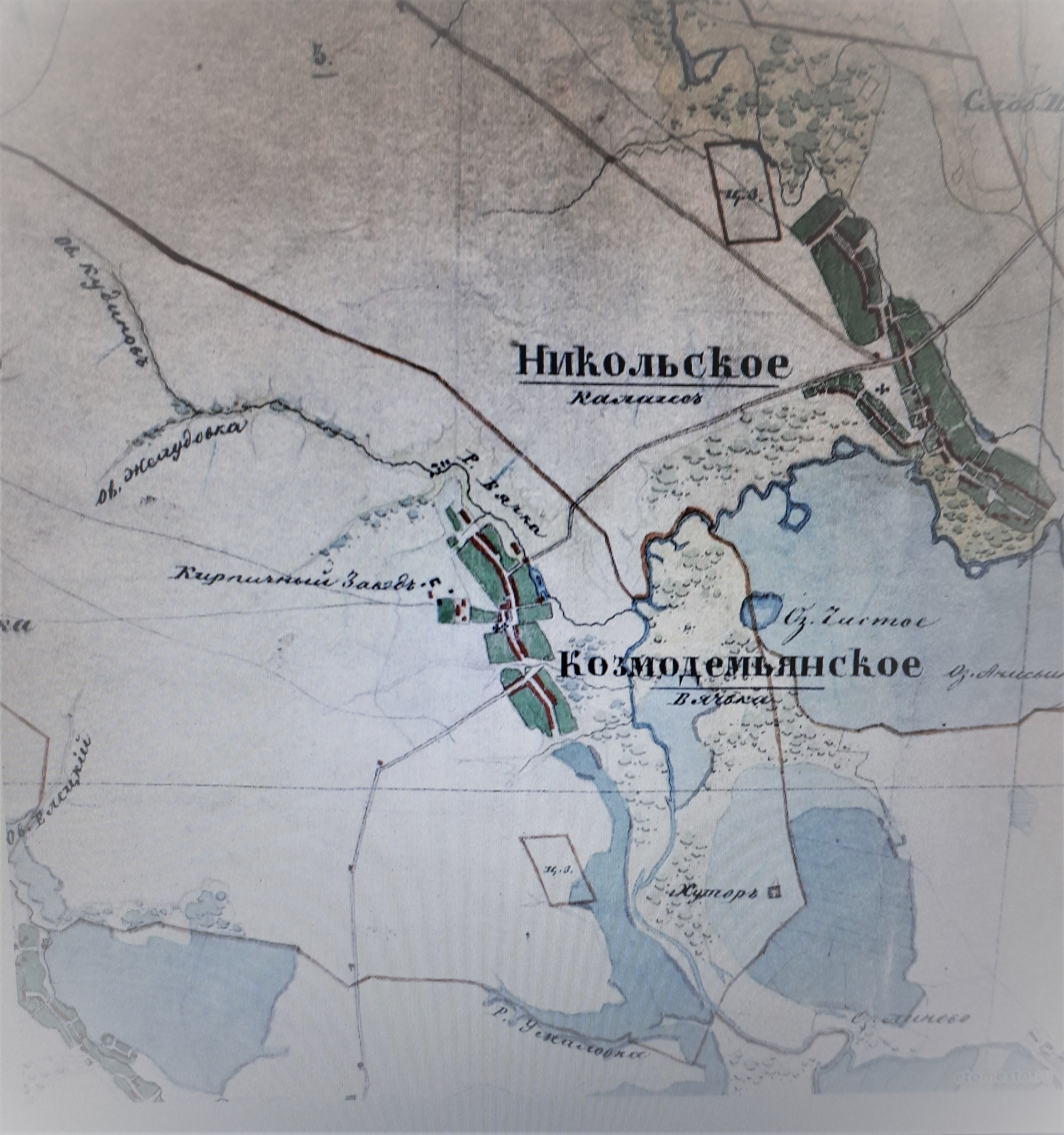 1862 г.